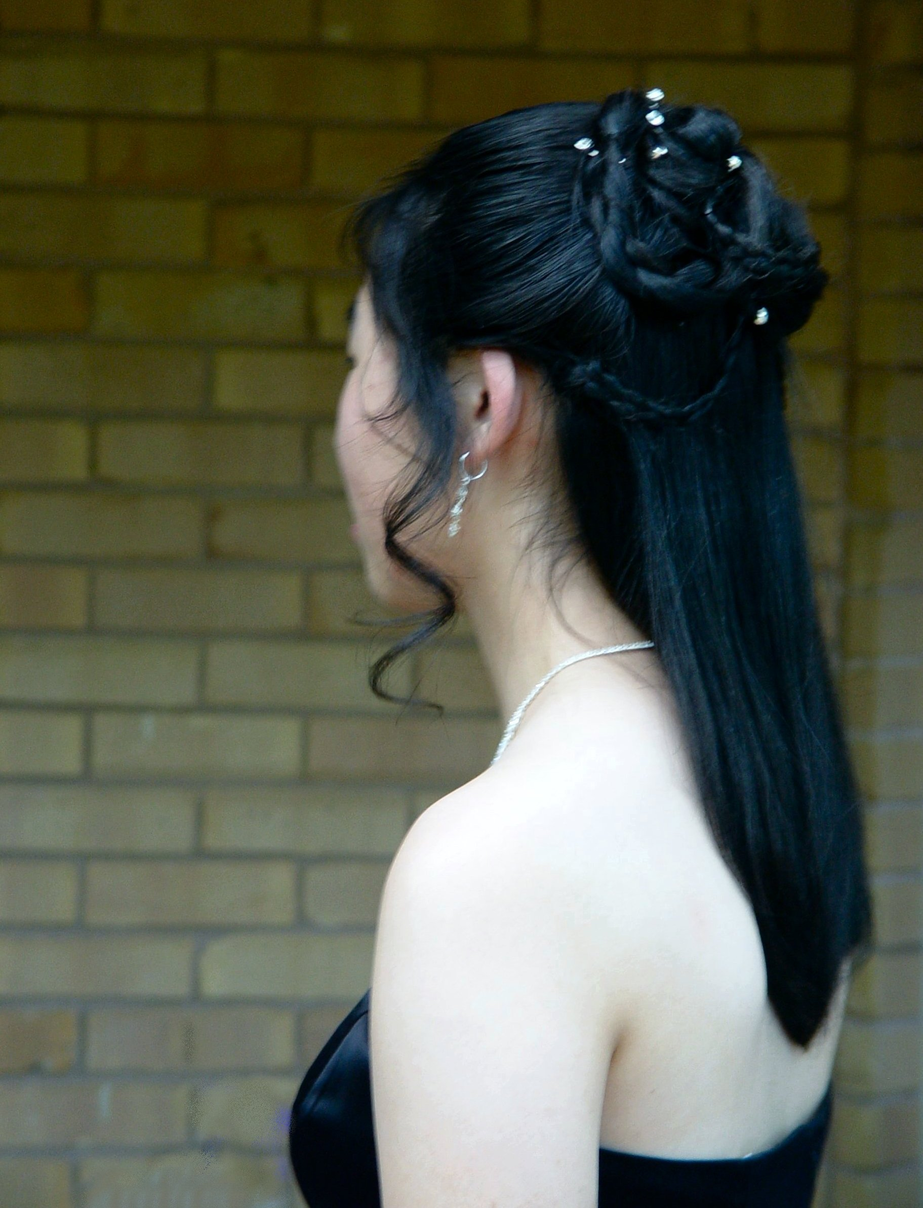 Schulterfreies Kleid.